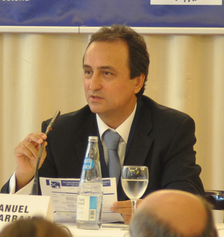 El secretari d'Estat d'Hisenda i Pressupostos del Govern Central obre la segona jornada de la Trobada d'Economia a S'Agaró